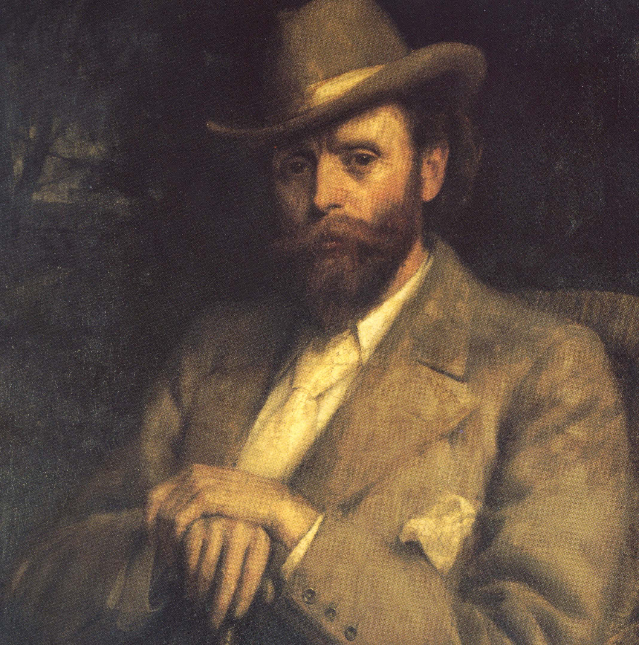 detail